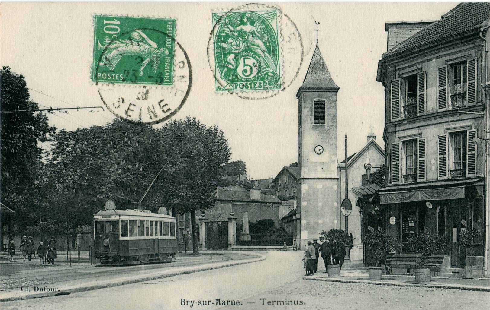 Carte postale ancienne éditée par DufourBry-sur-Marne : Terminus du tramway électrique Ligne 6b de la STCRP Place de la République à Paris - Bry-sur-Marne